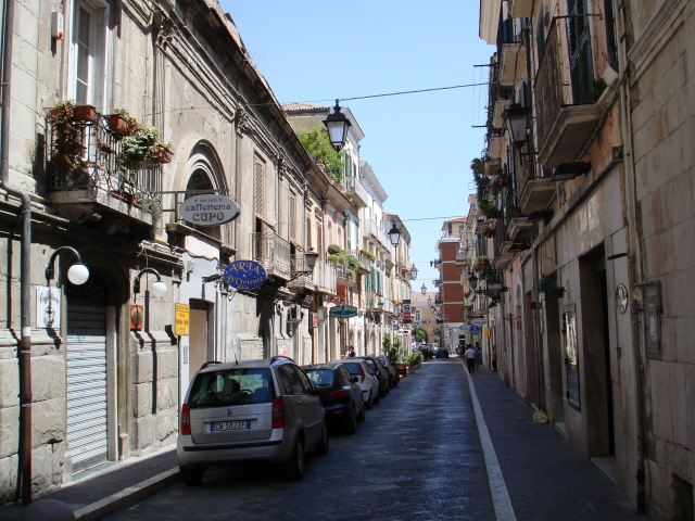 Via Arpi.